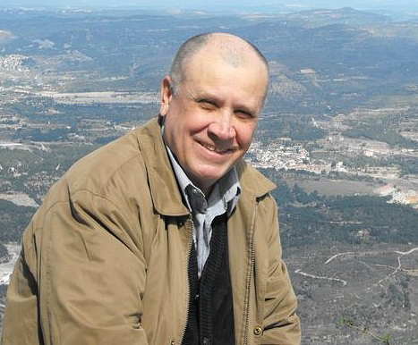 Российский политик, депутат Государственной думы Российской Федерации II и III созывов (1997—2003)